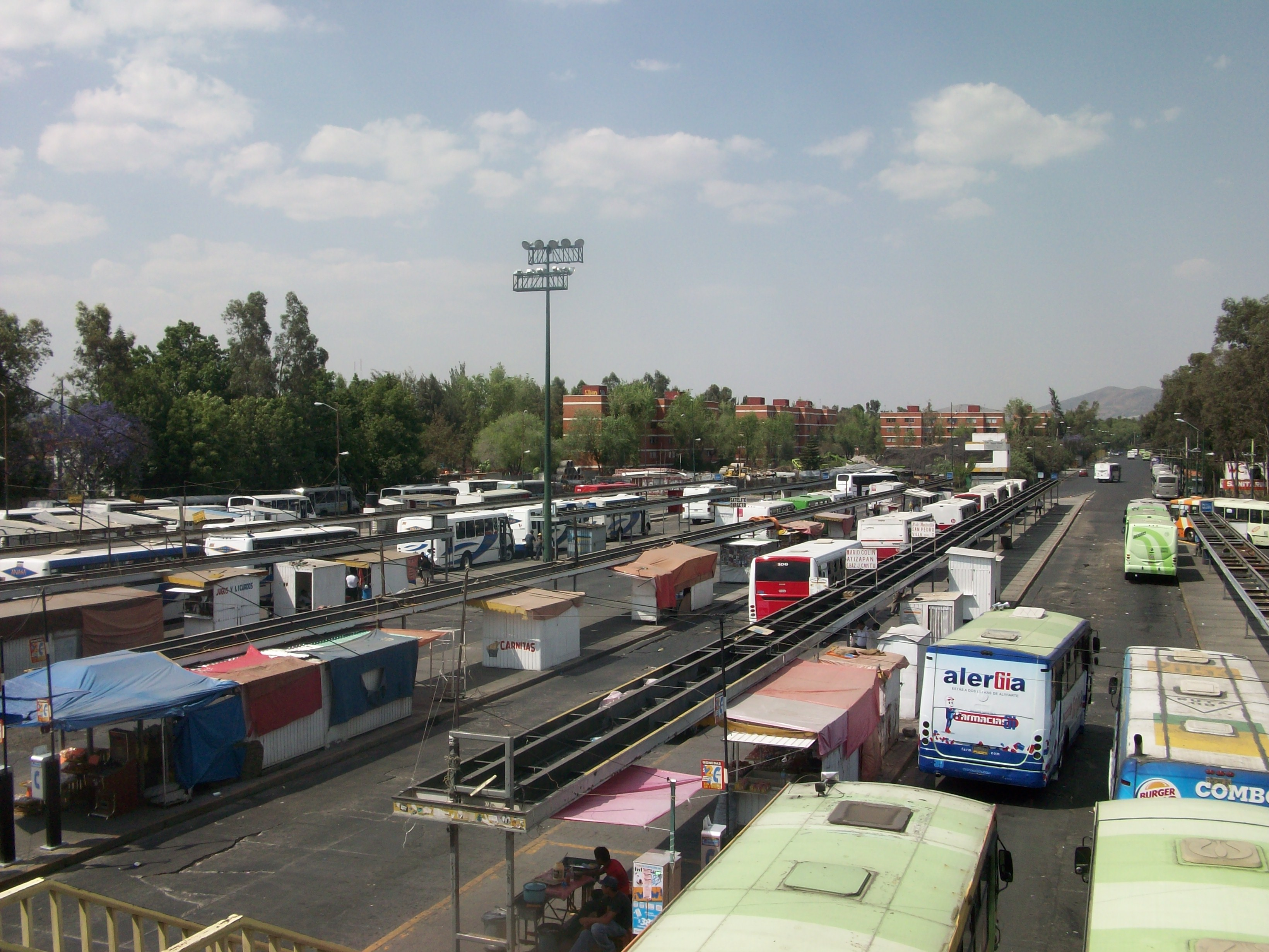 CETRAM de la estación El Rosario